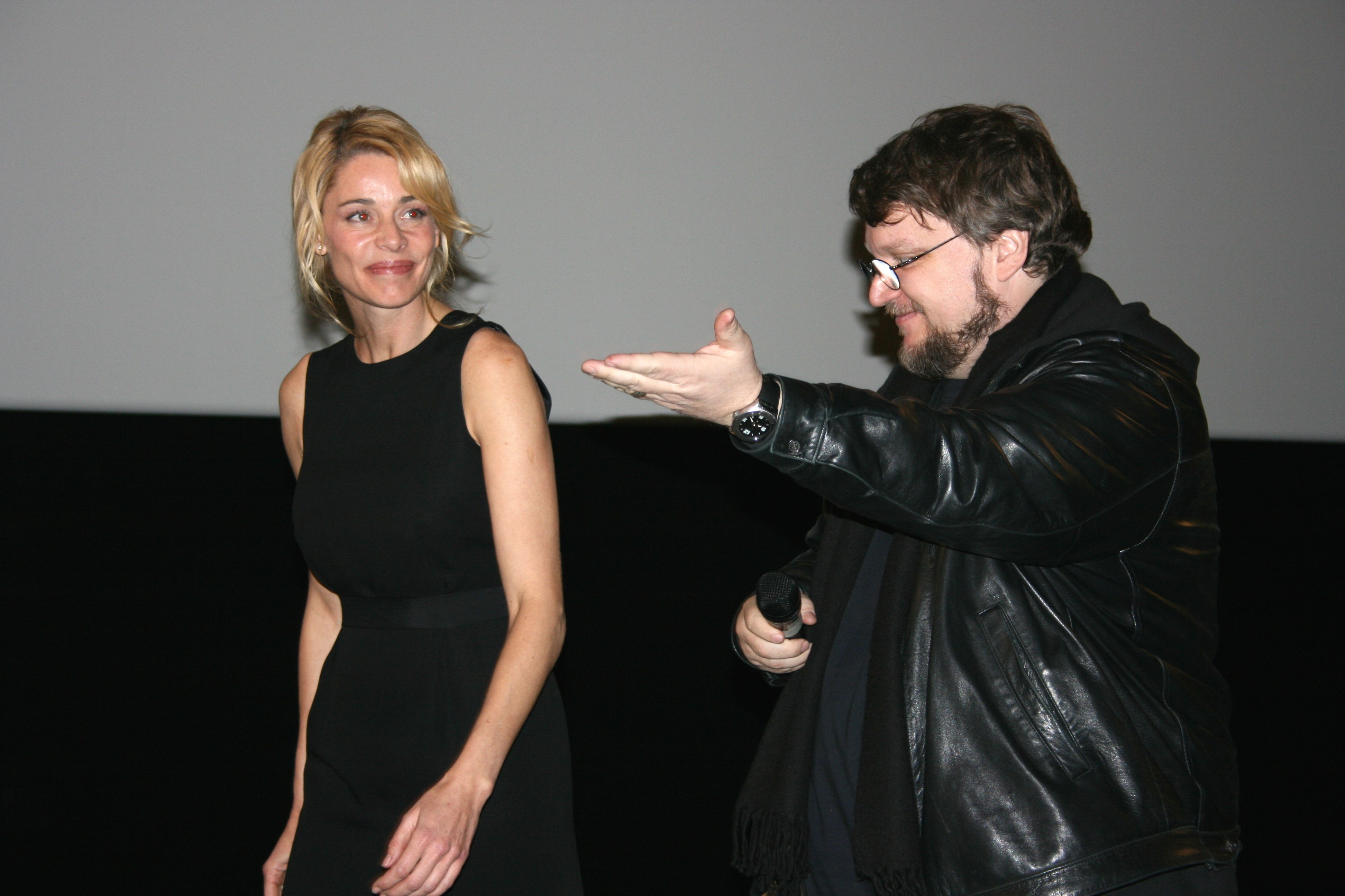 Belén Rueda et Guillermo del Toro à l'avant-première de L'Orphelinat diffusée à l'UGC Ciné Cité Les Halles, à Paris.